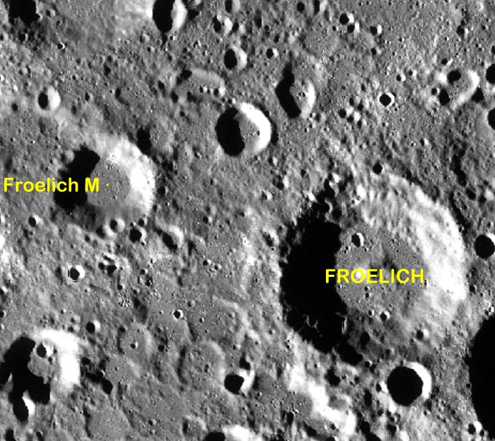 Cráter lunar Froelich. Cráter satélite. (Imagen LRO)